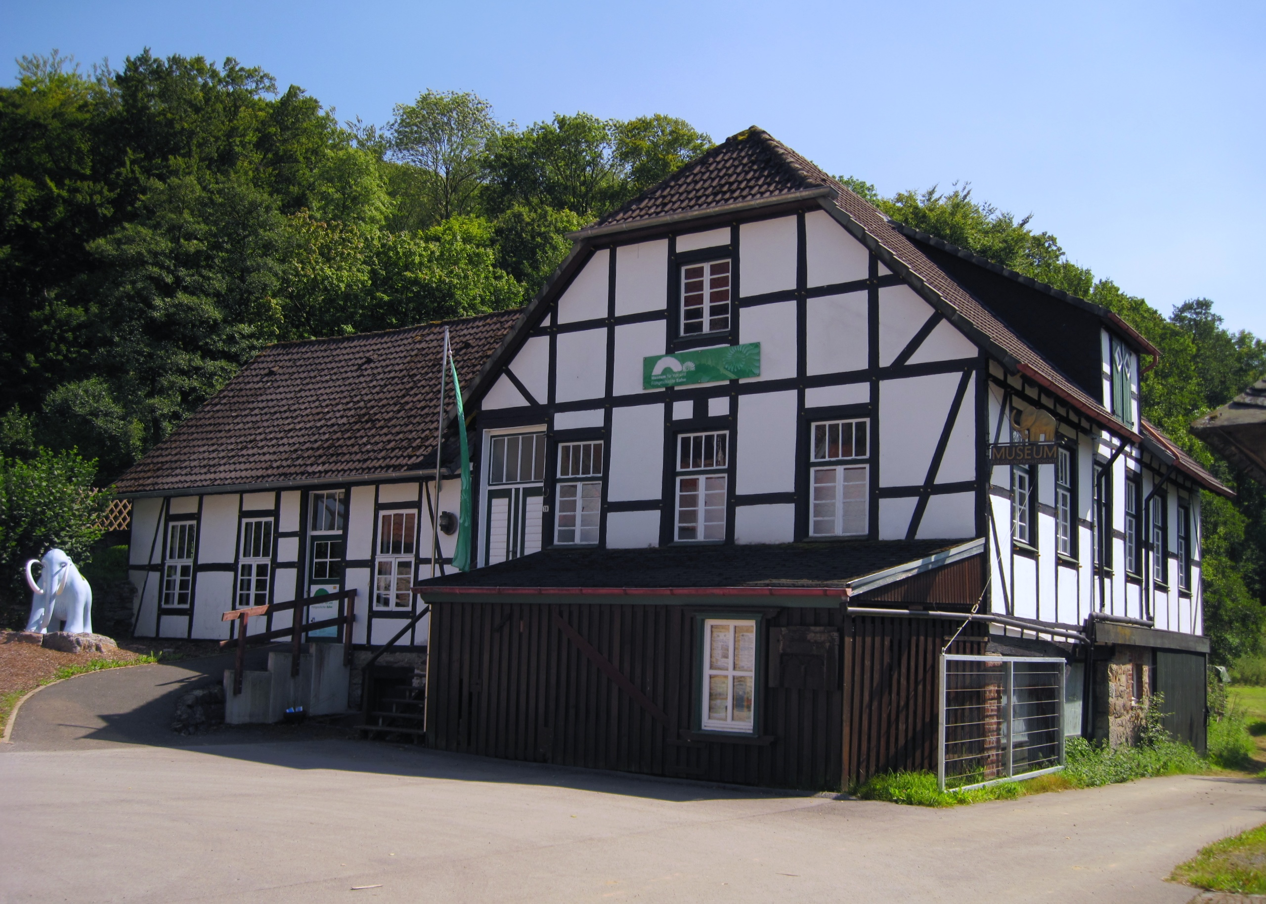 Gebäude des Museums für Vor- und Frühgeschichte im ehemaligen Wocklumer Stabhammer in Balve. Fachwerkflügelgebäude unter Krüppelwalmdach. Bauliche Anlage der unter Denkmalschutz stehenden Luisenhütte Wocklum.